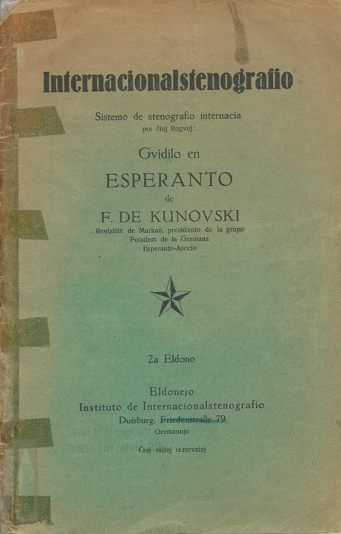 kovrilo de "Internacionalstenografio", 1928